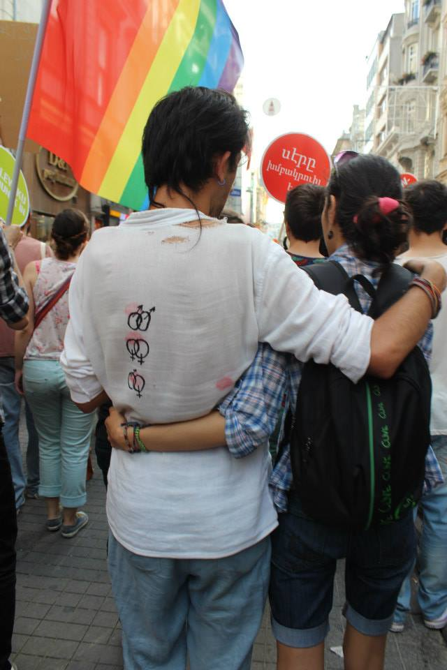 LGBT Onur Haftası, 21. LGBT Onur Yürüyüşü, 2013, Taksim, İstanbul.